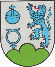 Wappen von Rutsweiler am Glan